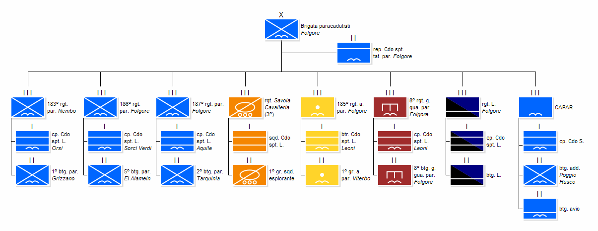 Attuale struttura della Brigata Paracadutisti "Folgore"